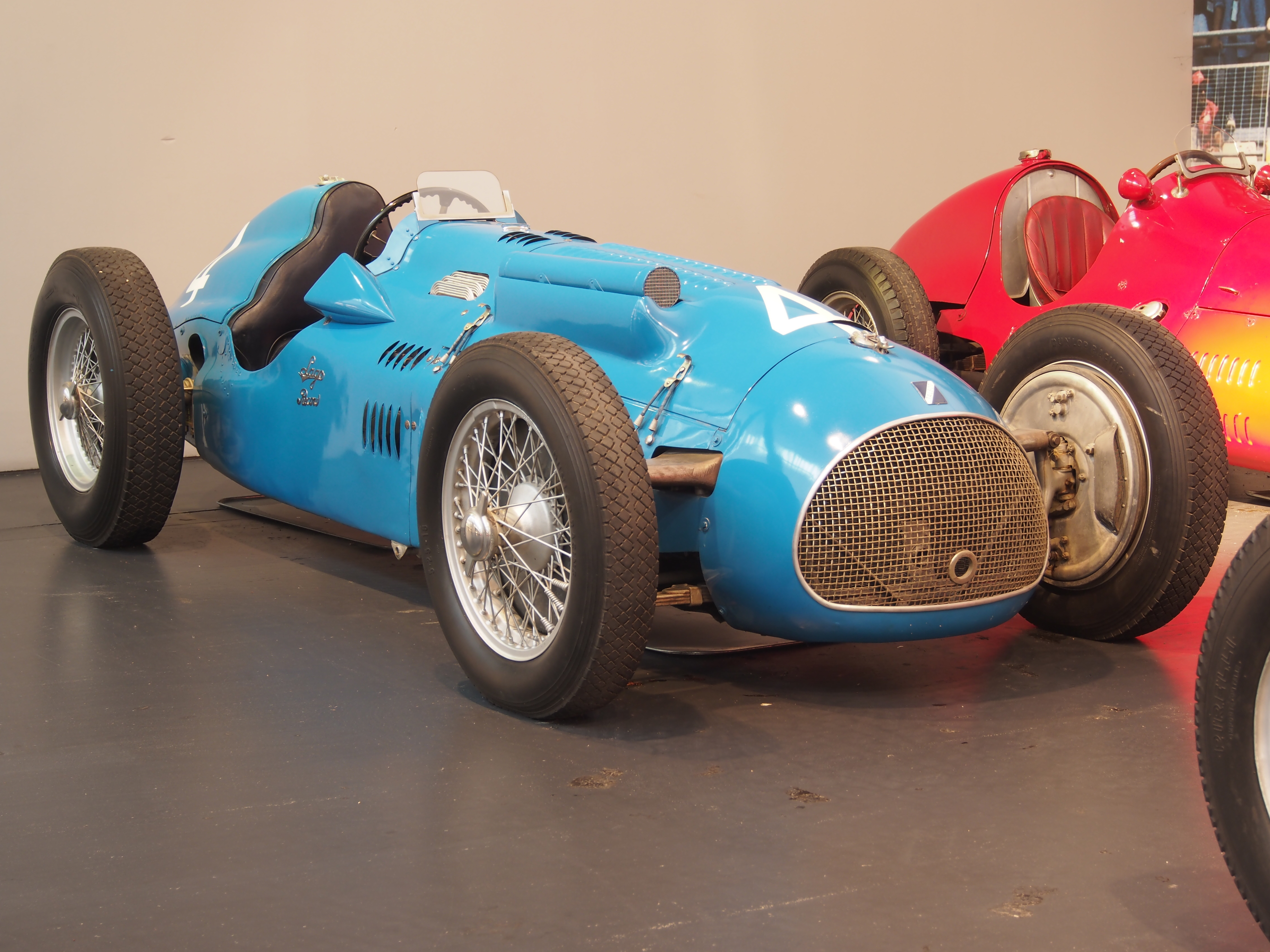 Photographed at the Cité de l’Automobile, Musée national de l’automobile, Collection Schlumpf, Mulhouse, France.